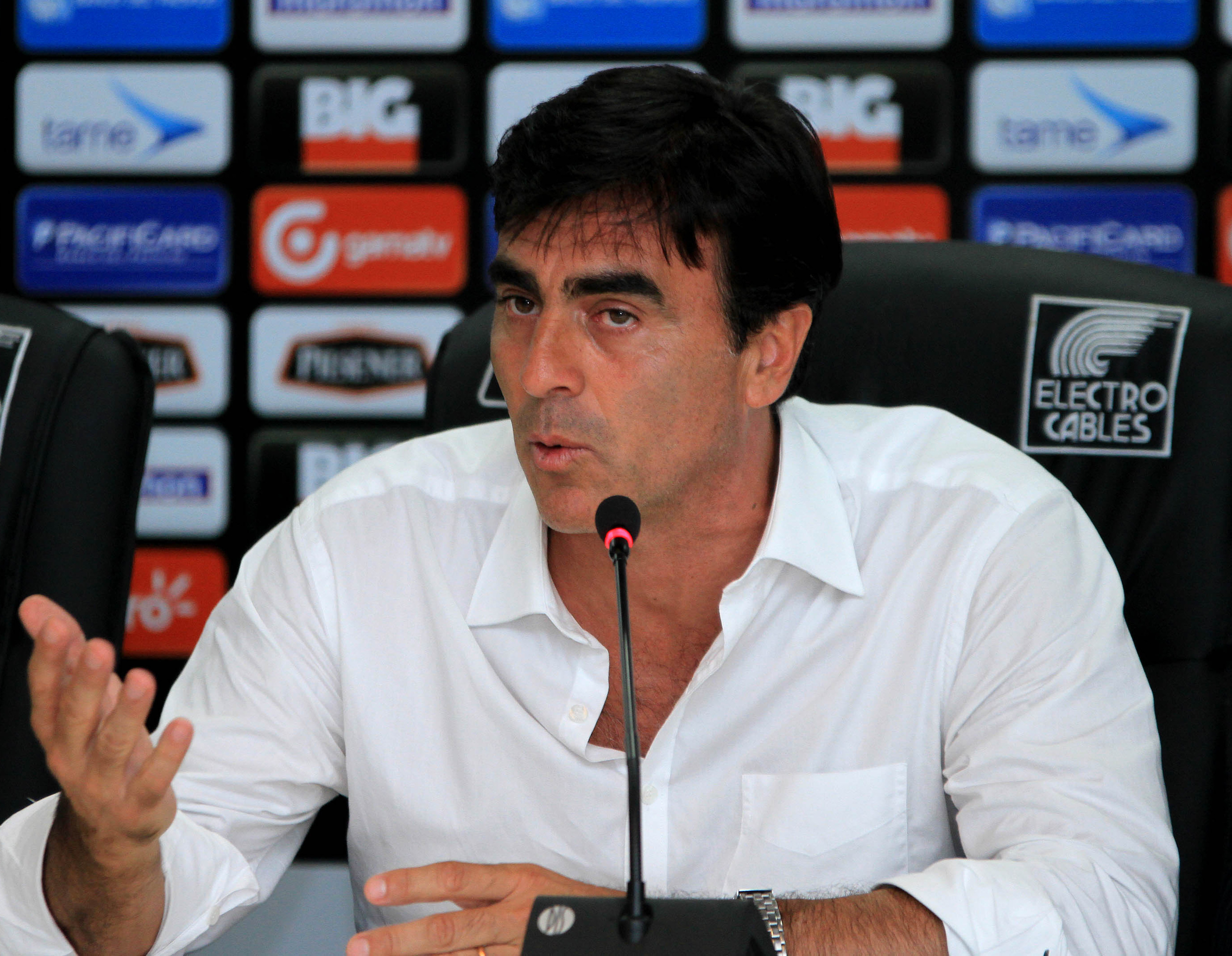 Guayaquil, viernes 30 de enero del 2015 (ANDES).-Mediante rueda de prensa se oficializó la salida del director técnico de Emelec Gustavo Quinteros, quien asumirá desde mediados de marzo la dirección de la selección ecuatoriana de fútbol Foto:César Muñoz/ANDES